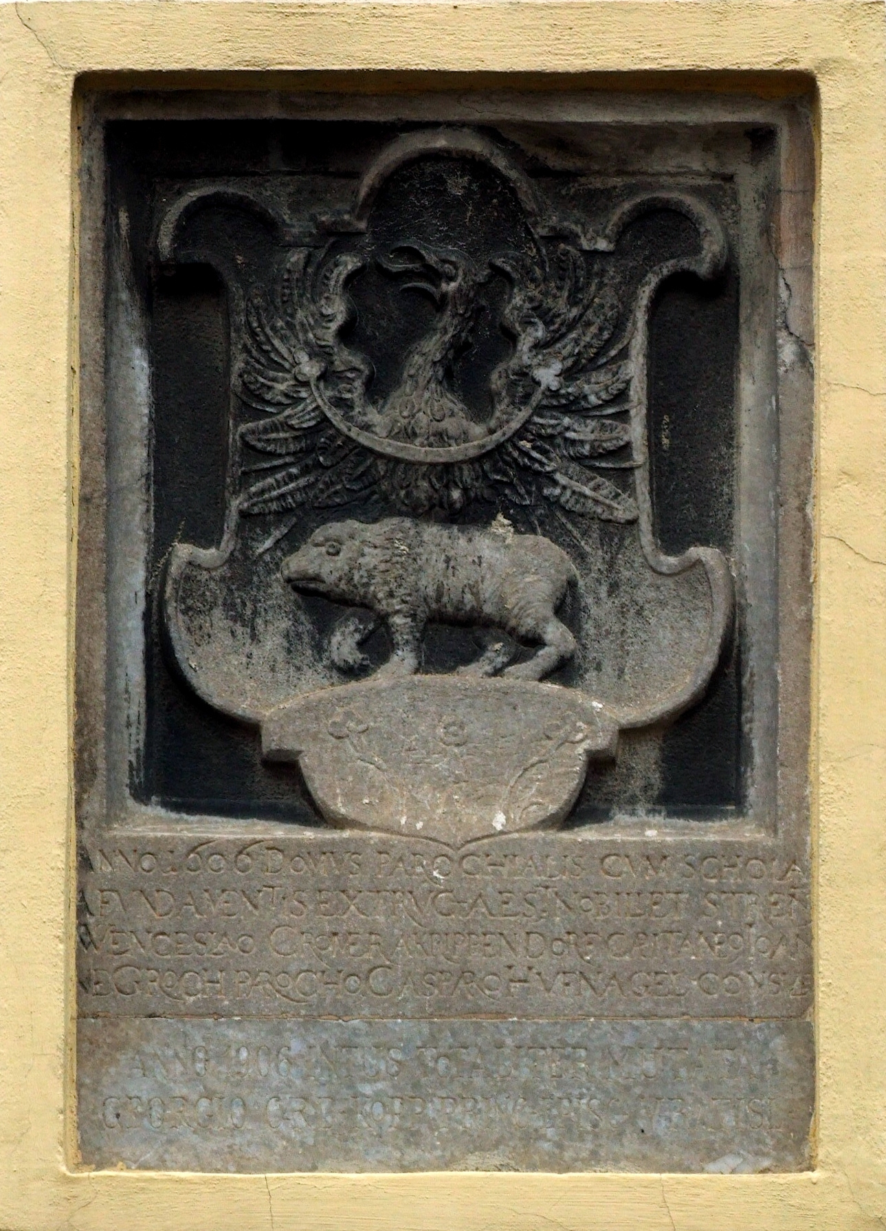 Jeseník - starý znak města z roku 1606